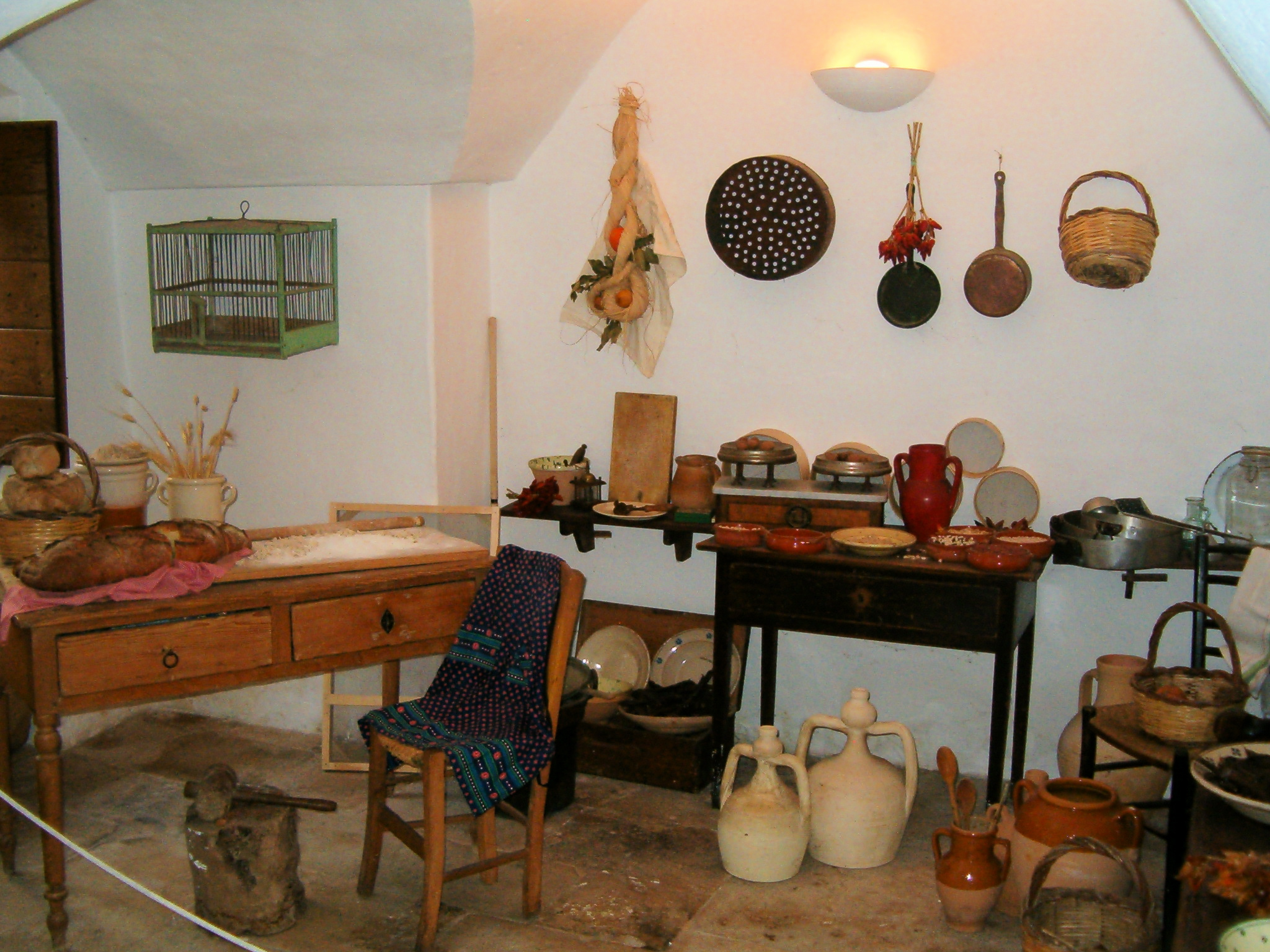 Trulli di Alberobello, Italy Cucina all'interno del Trullo Sovrano